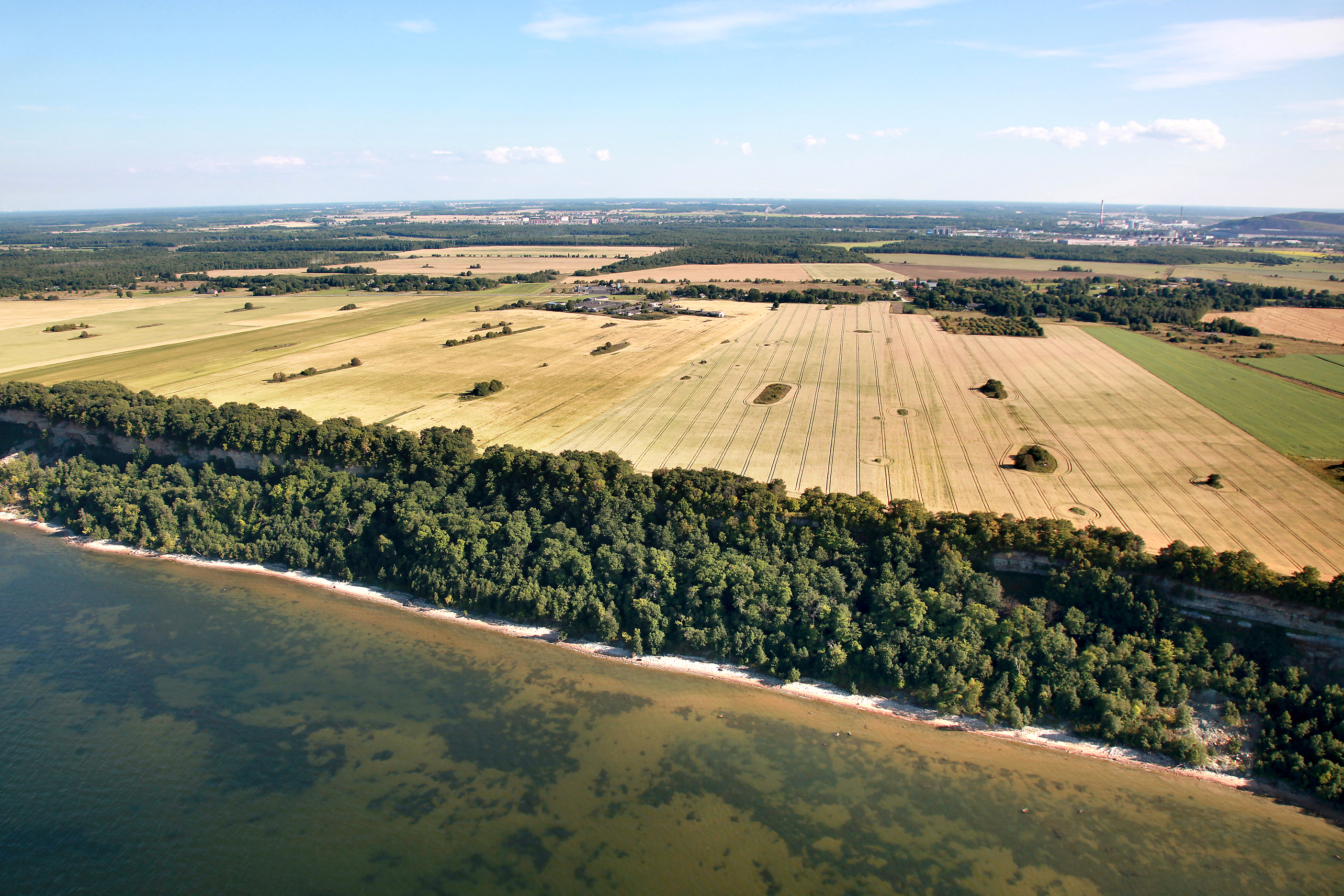 Ontika pankranniku aerofoto